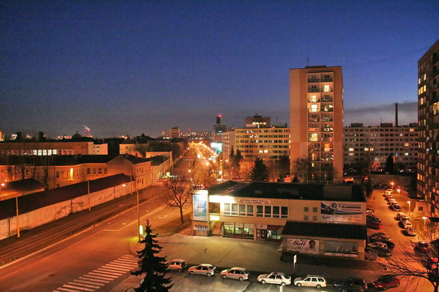 Kuzmany Street Kosice, SVK